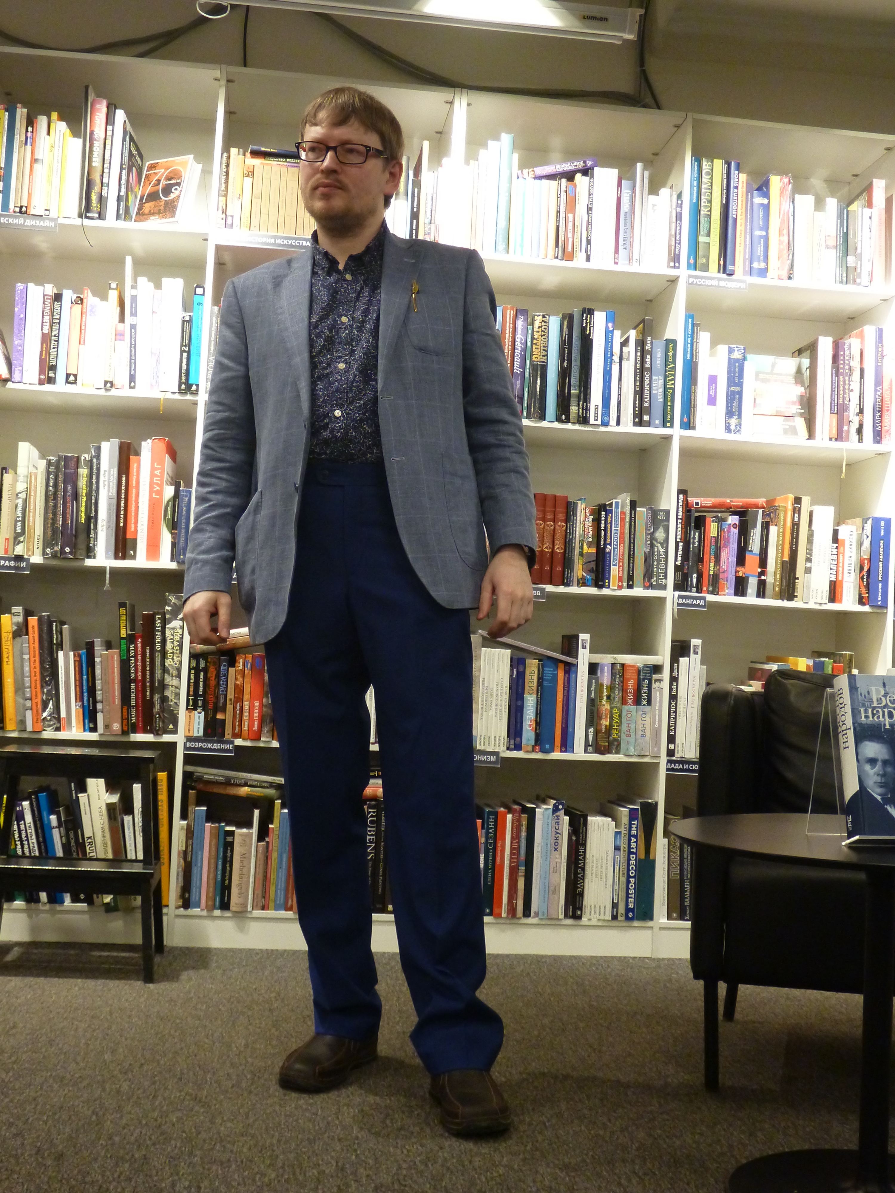 Сергей Станиславович Беляков в Пиотровском 12 декабря 2019 года